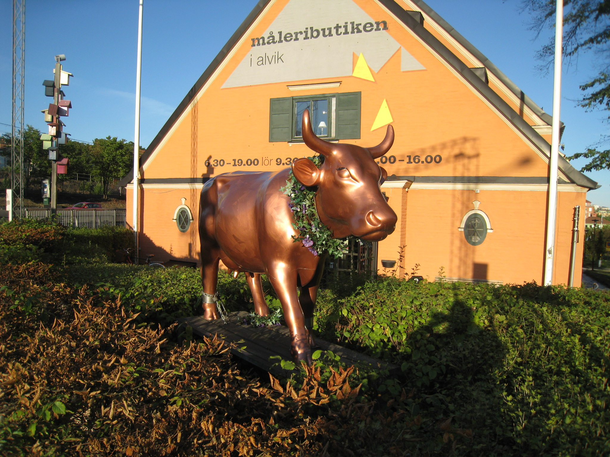 Kossan Dottie står utanför Alviks Måleributik AB (f.d. biografen Bromma-Teatern), Gustavslundsvägen 174 i Alvik, Bromma. Kon är gjord av arkitekten Thomas Sandell (född 1959) till The CowParade i Stockholm 2004. Den inköptes efter utställningen av målade kor runt stan på auktion till förmån för BRIS. År 2014 ändrades kulören, efter Sandells medgivande, från vit till den nuvarande kopparfärgen genom Alviks måleributik.